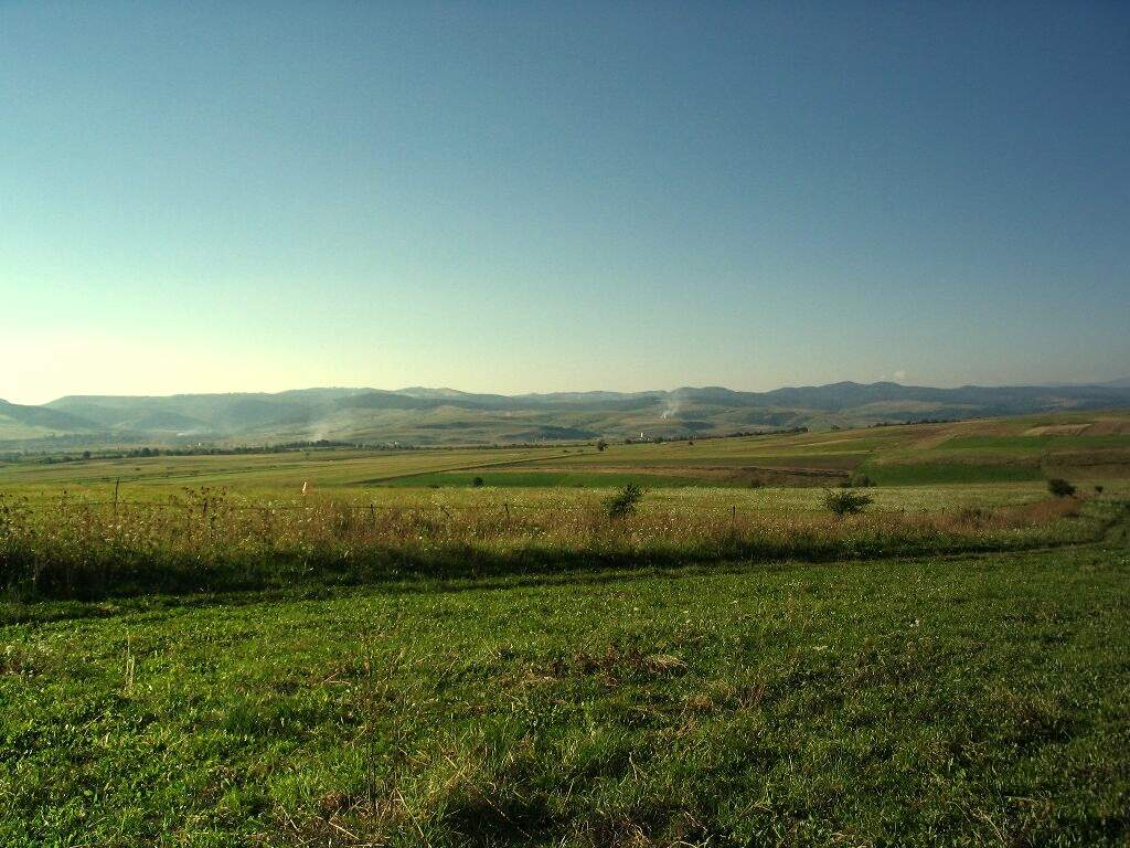 A Kormos-patak völgye, háttérben a Rika-hegység, Hargita megye, Erdély